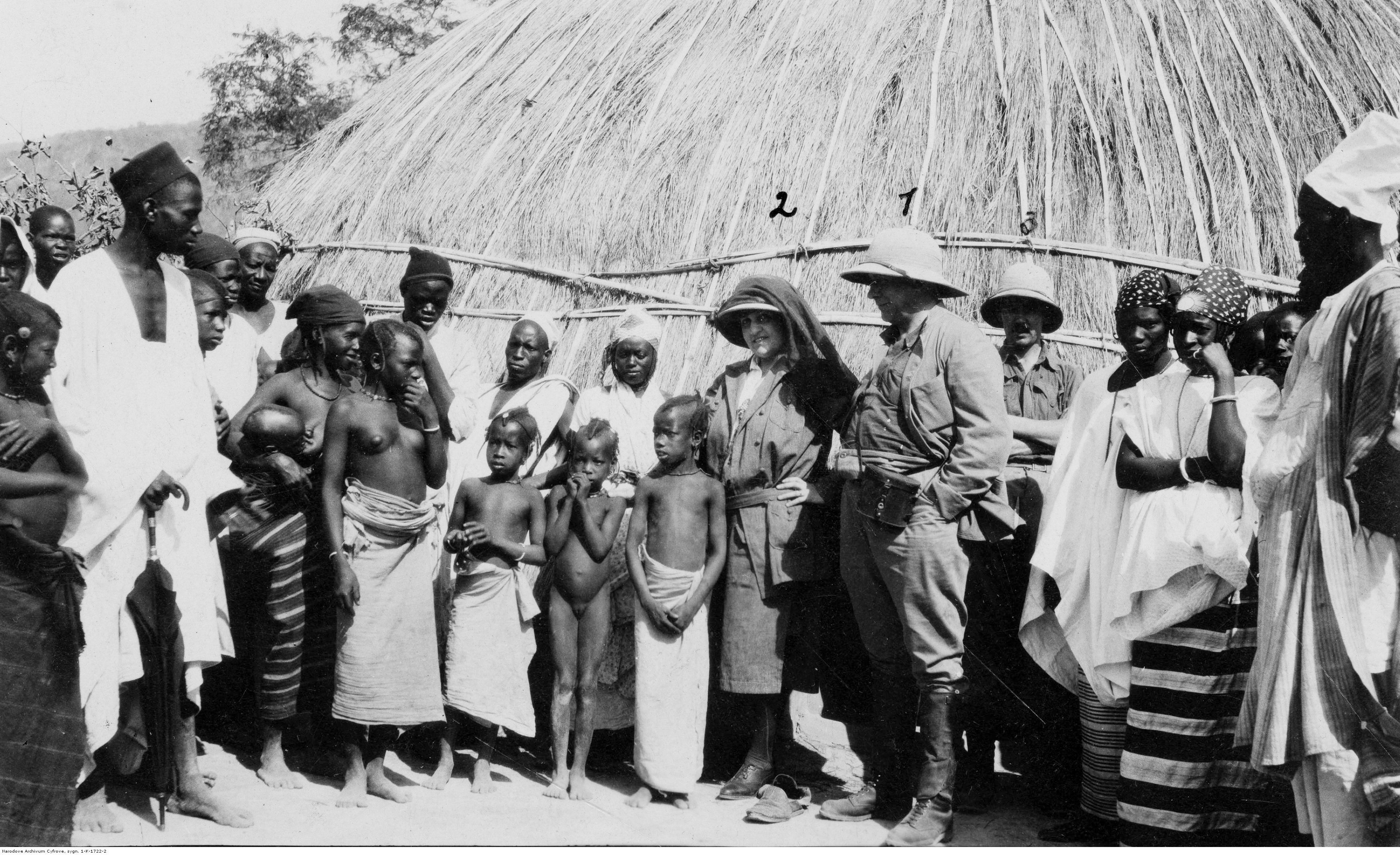 Ferdynand Ossendowski (trzyma ręce w kieszeni) podczas ekspedycji do Gwinei 1926. (Koncern Ilustrowany Kurier Codzienny - Archiwum Ilustracji)